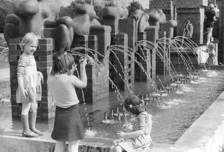 ADN-ZB-Rehfeld-4. 6. 80-pe-Berlin: Ein neuer Brunnen sprudelt seit kurzem im Wohngebiet am Tierpark. Die junge Grafikerin Christiane Wartenberg schuf diese Anlage mit mehreren Wasserbecken, mit Sockeln und Pfeilern aus handgeformten und teilweise farbig glasierten Klinkern.